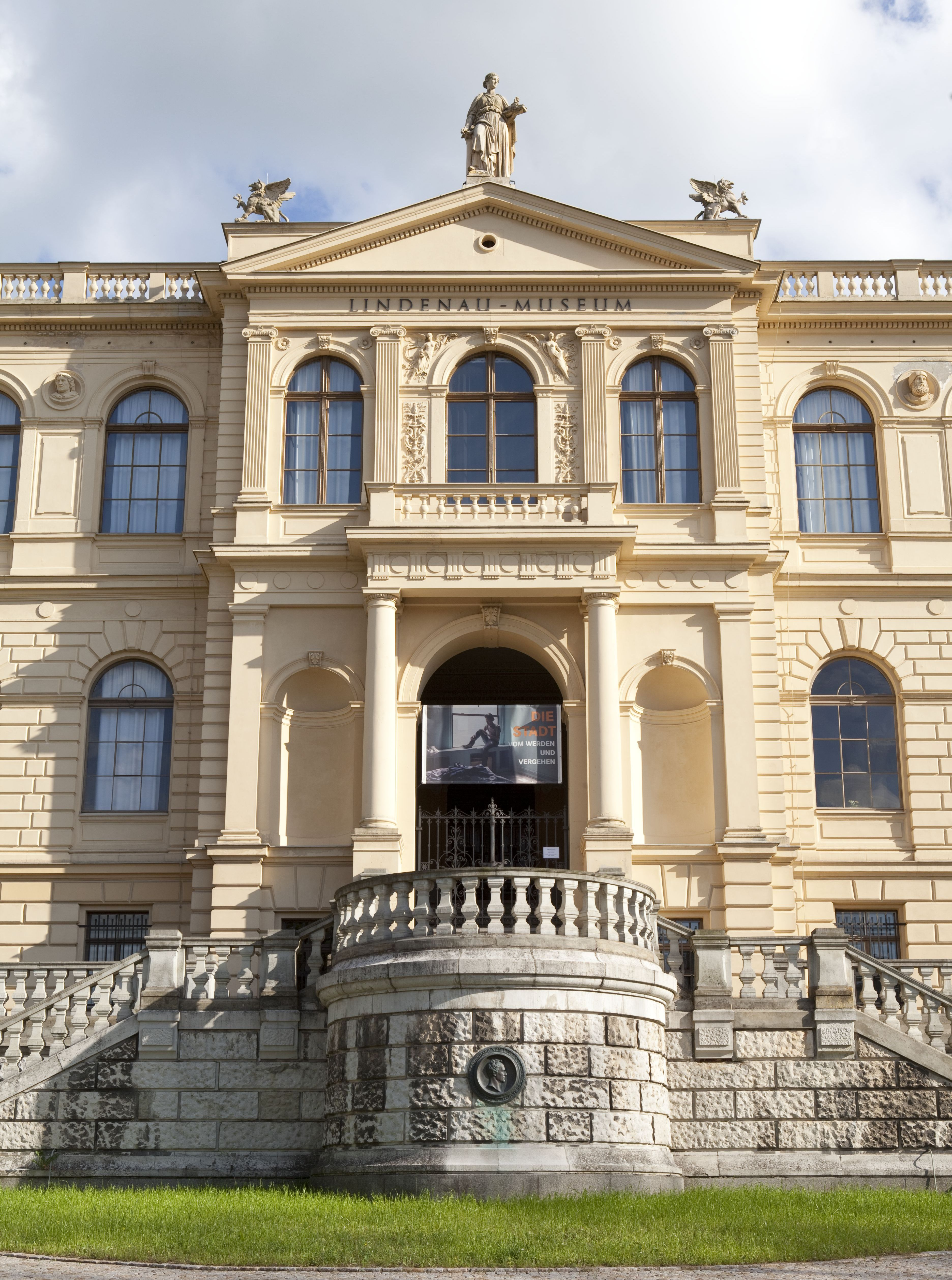 Außenansicht des Lindenau-Museums Altenburg (Mittelrisalit)